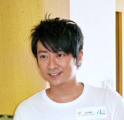 孫耀威 Suen Yiu Wai,Eric 於港台拍照Bân-lâm-gú: Sun Iāu-ui. 孫耀威